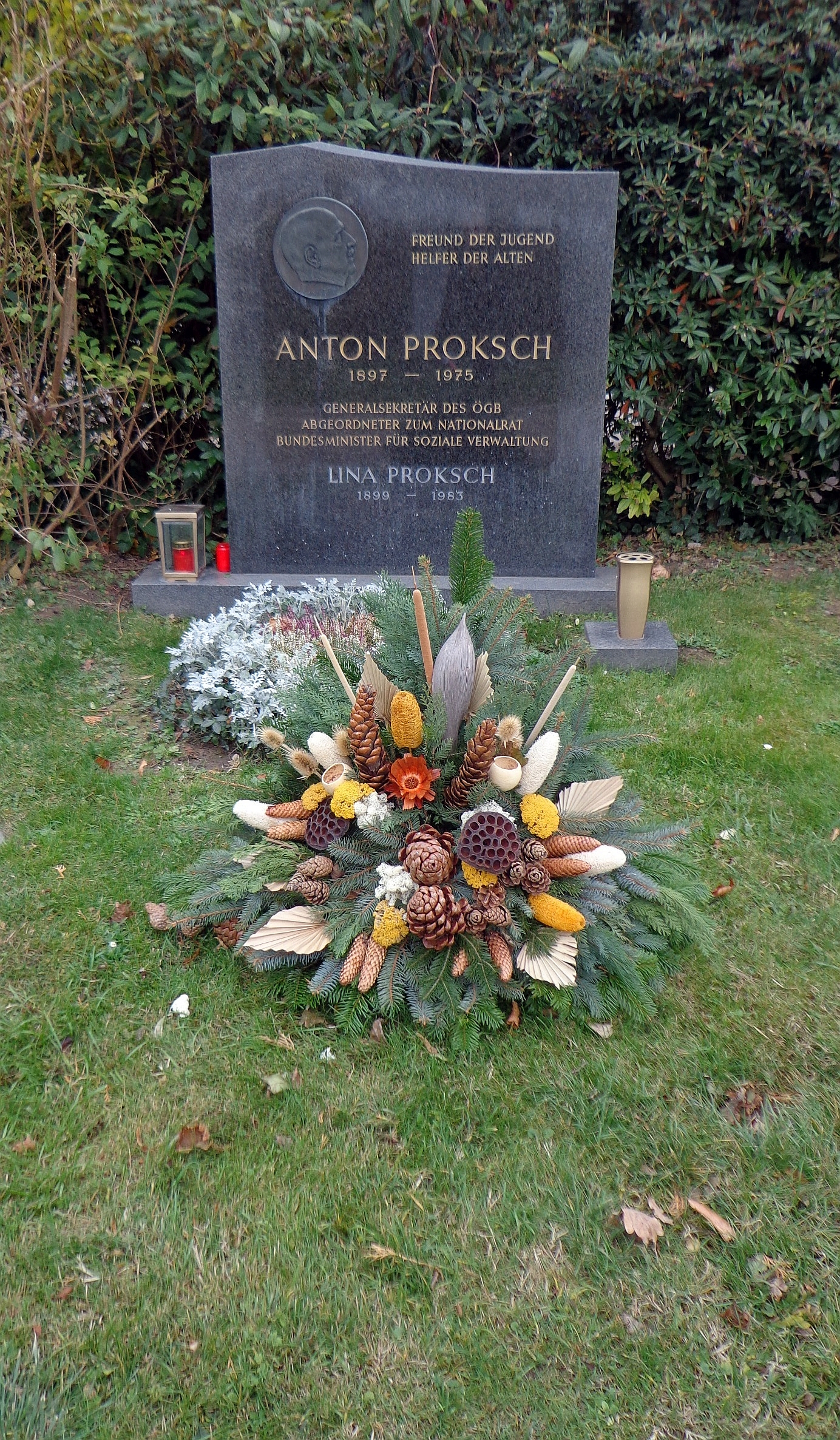 Wiener Zentralfriedhof - Gruppe 14 C, Ehrengrab von Anton Proksch